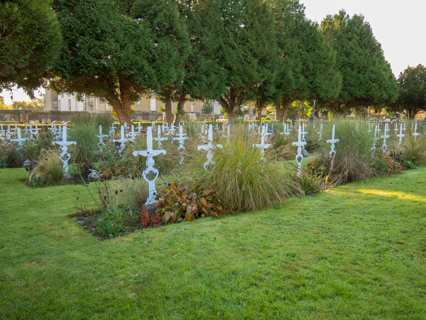 Arras Communal Cemetery